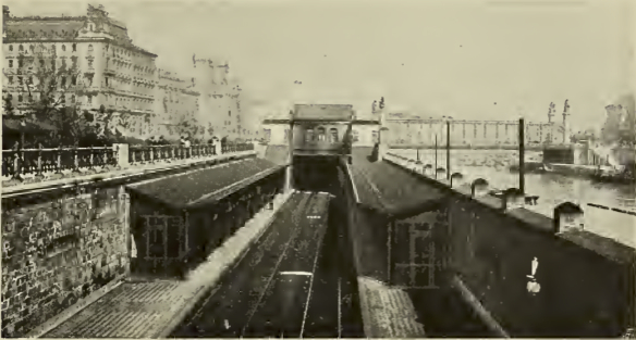 Wien - Stadtbahn. Details siehe Dateiname.